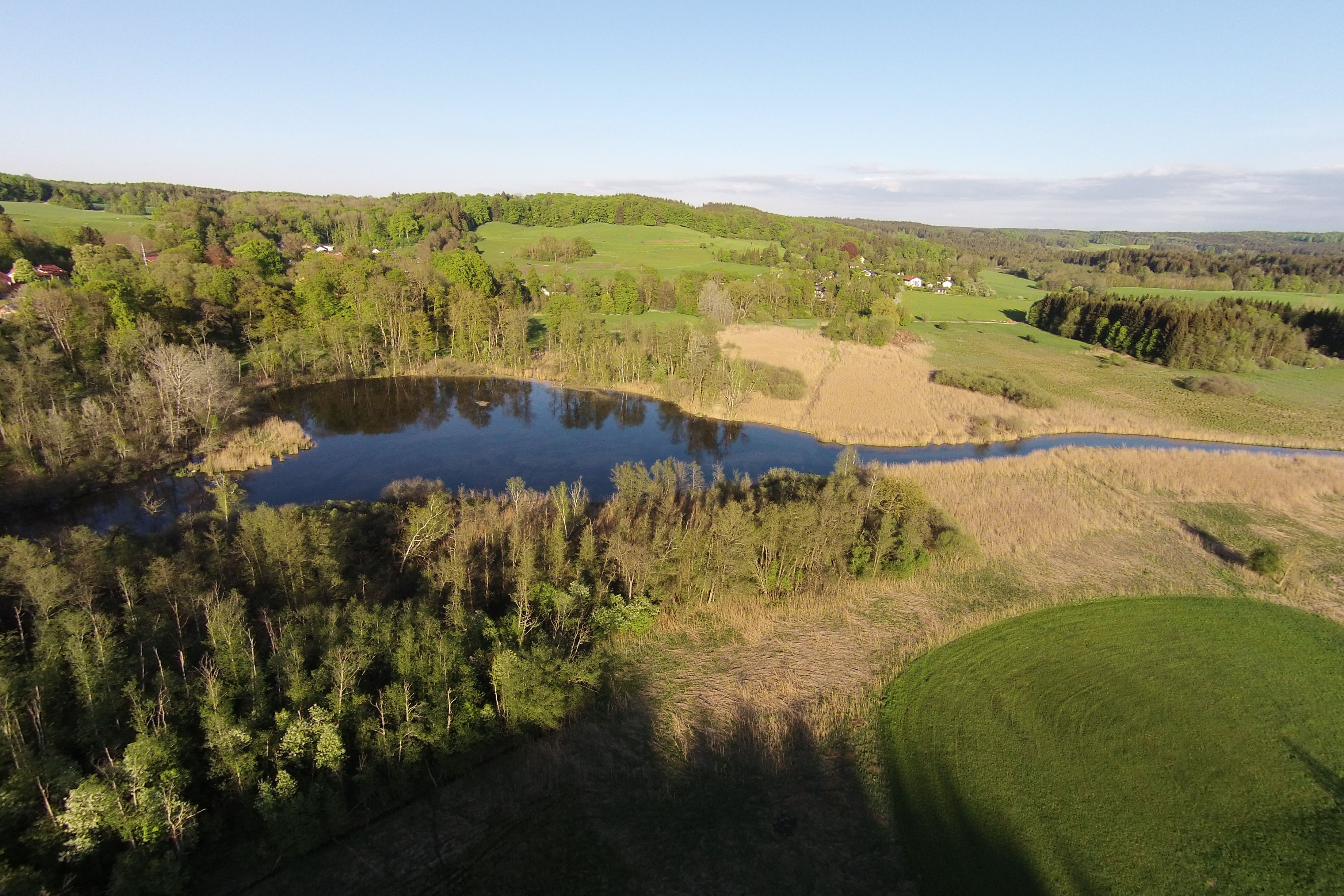 Die Würm im Naturschutzgebiet „Leutstettener Moos“ (NSG-00228.01); Endmoränen des Würmsee-Zungenbeckens (Geotop 188R009).